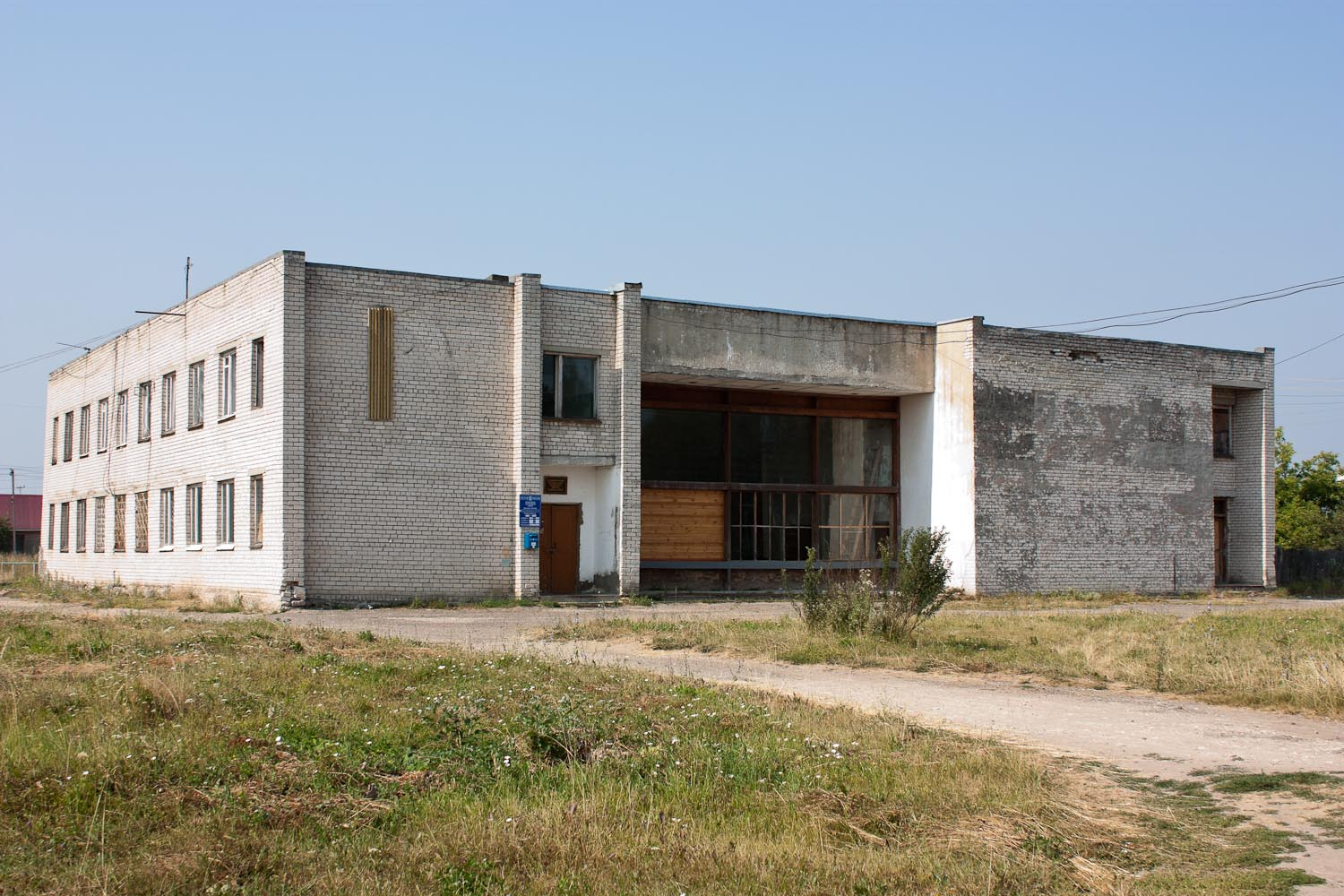 Здание администрации посёлка (2010.07.24)